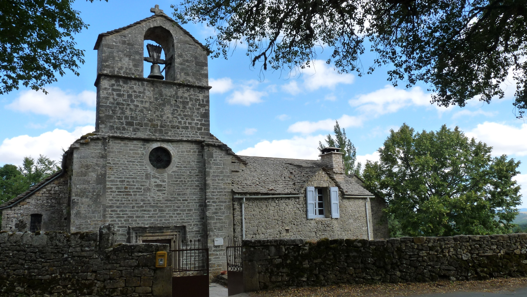 Église de Saint-Pierre-des-Tripiers, en Lozère.